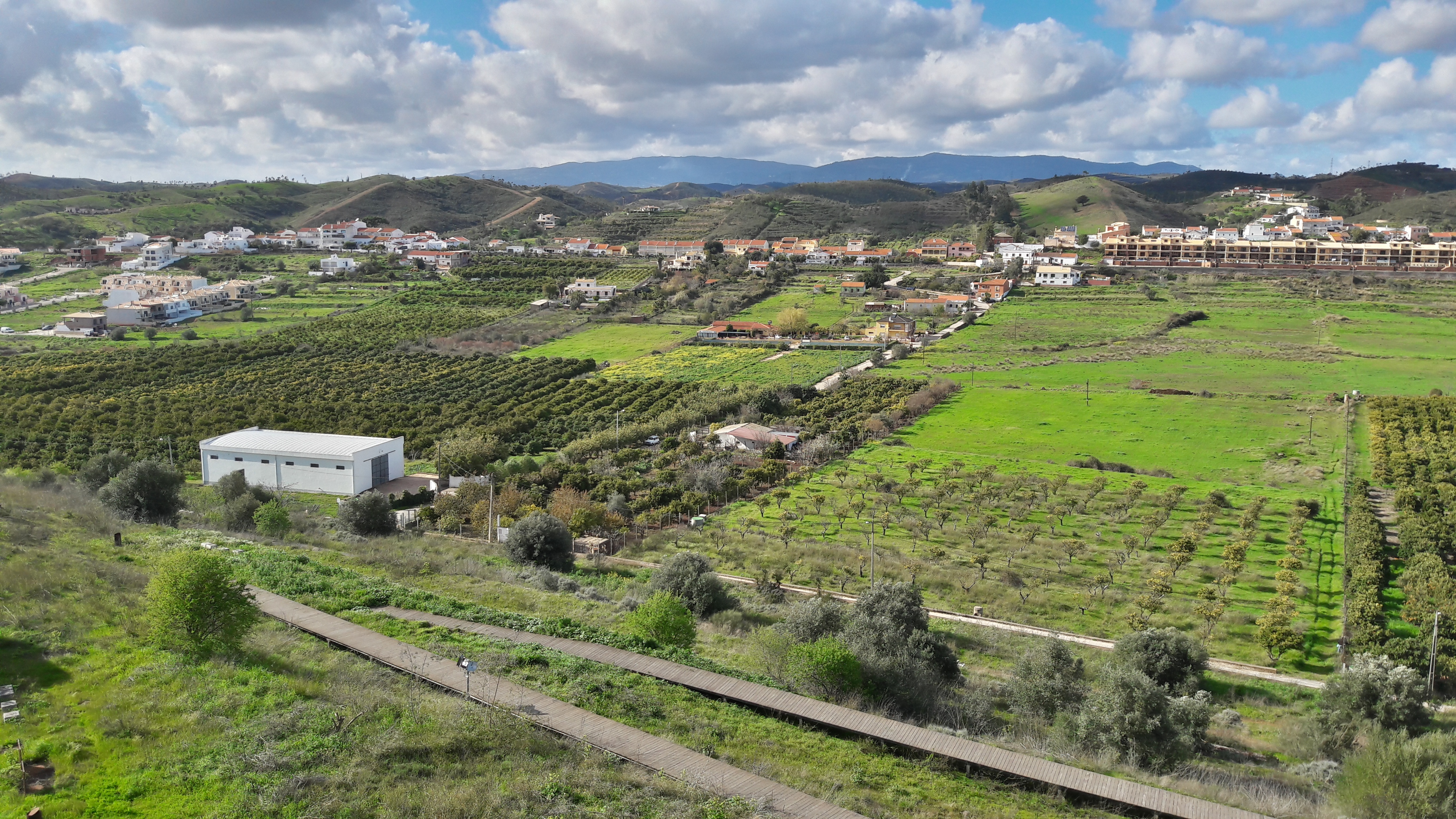 Silves - vista do castelo 6. 03/2018.